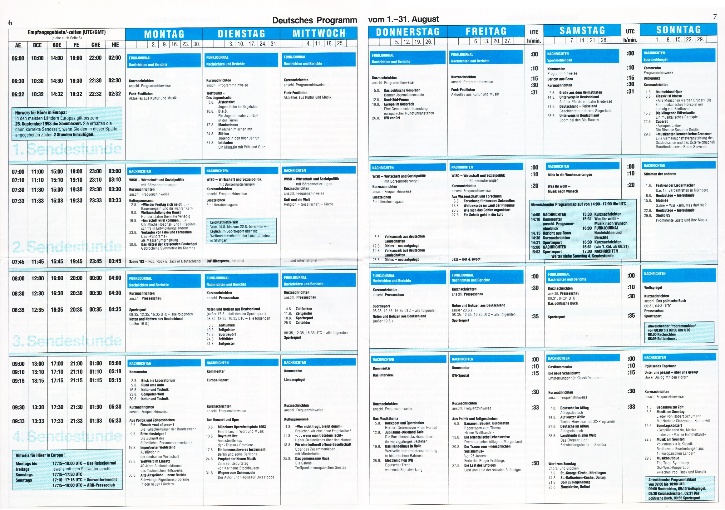 Deutsche Welle - deutsches Programm (August 1993)